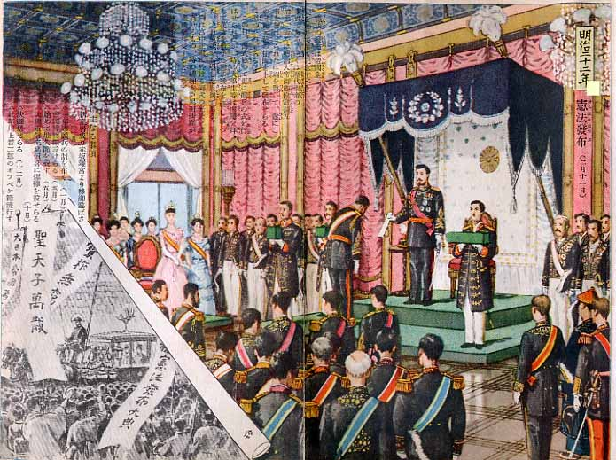 大日本帝国憲法発布